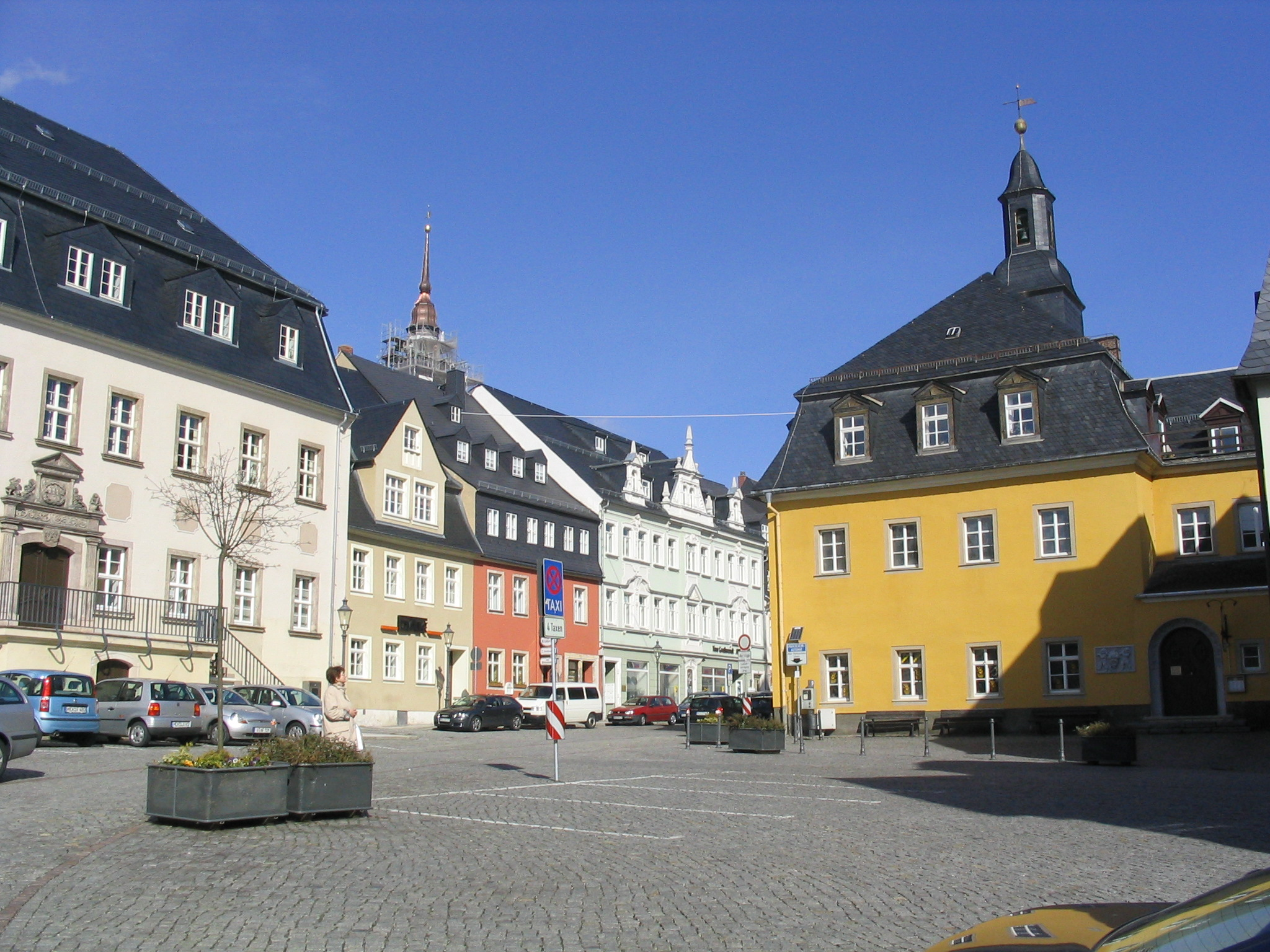 Blick vom Untermarkt, Rechts neues, links altes Rathaus Rathaus, aufgenommen am 15.04.2006 von Dr. Hagen Graebner